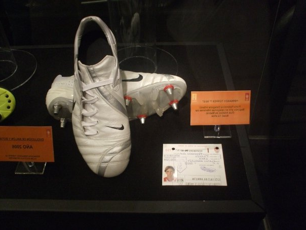 Botas de Fernando Torres